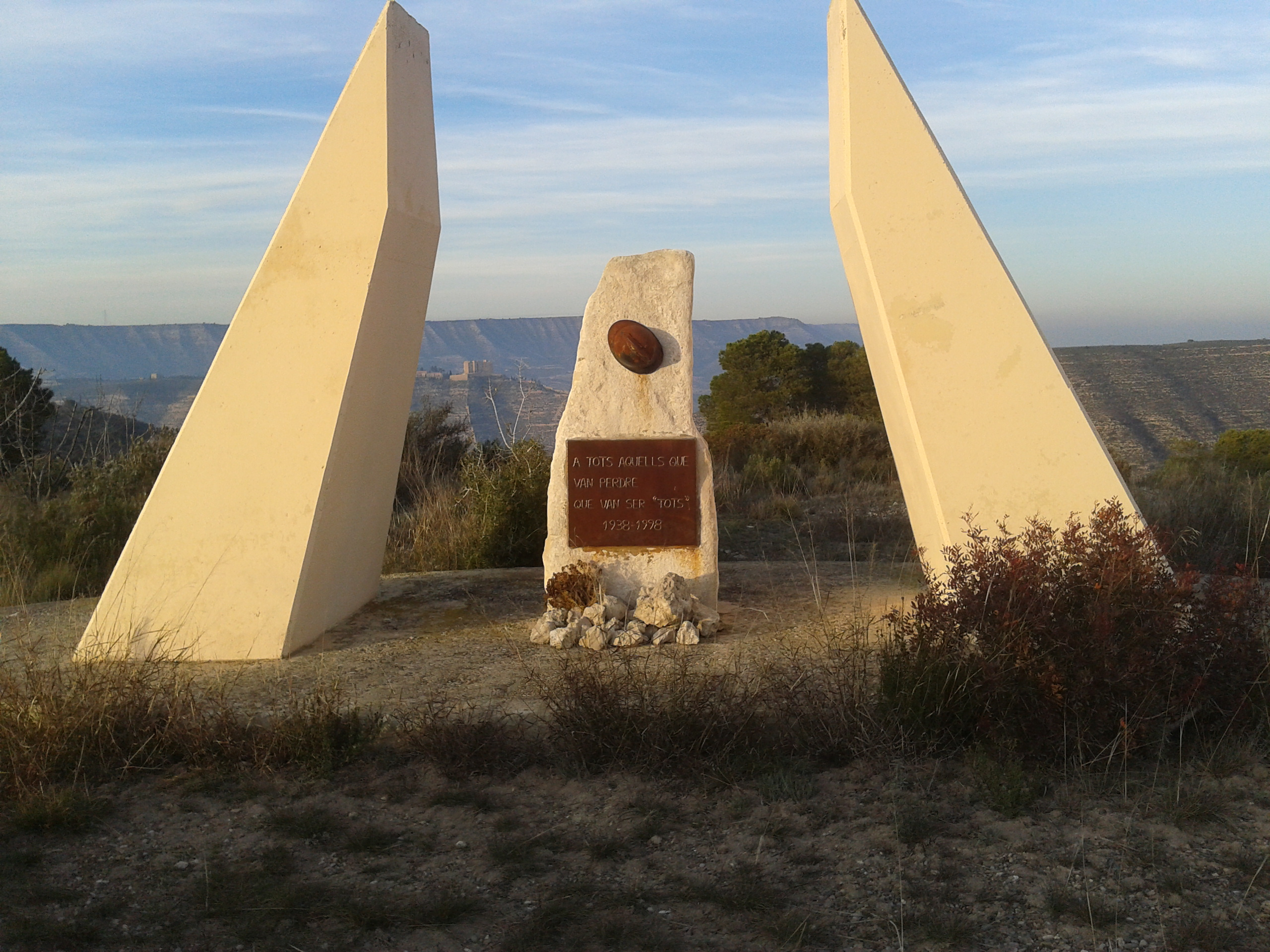 Miles de jóvenes españoles murieron es esta batalla. Esta batalla como todas, sirve para las ambiciones de los poderosos y el sufrimiento de los pobres